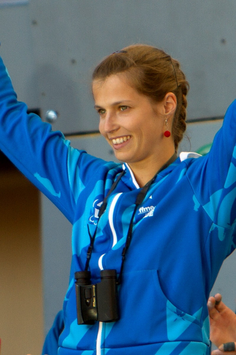 Présentation des participants à la finale de la coupe du monde d'escalade de Briançon - 2012